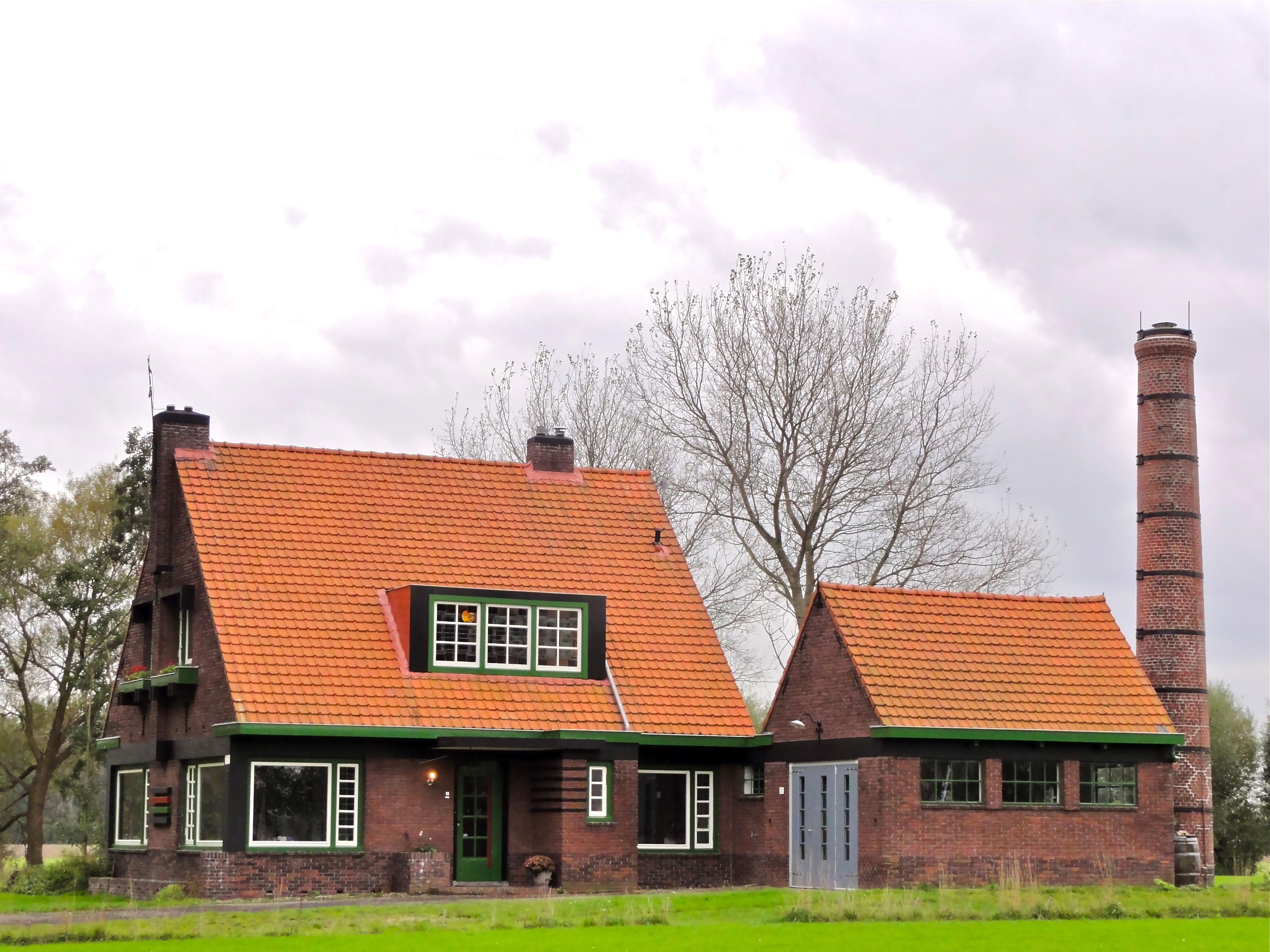 Tuinderij (woonhuis + schoorsteen) Hoofdstraat 23 te Niekerk (de Marne)